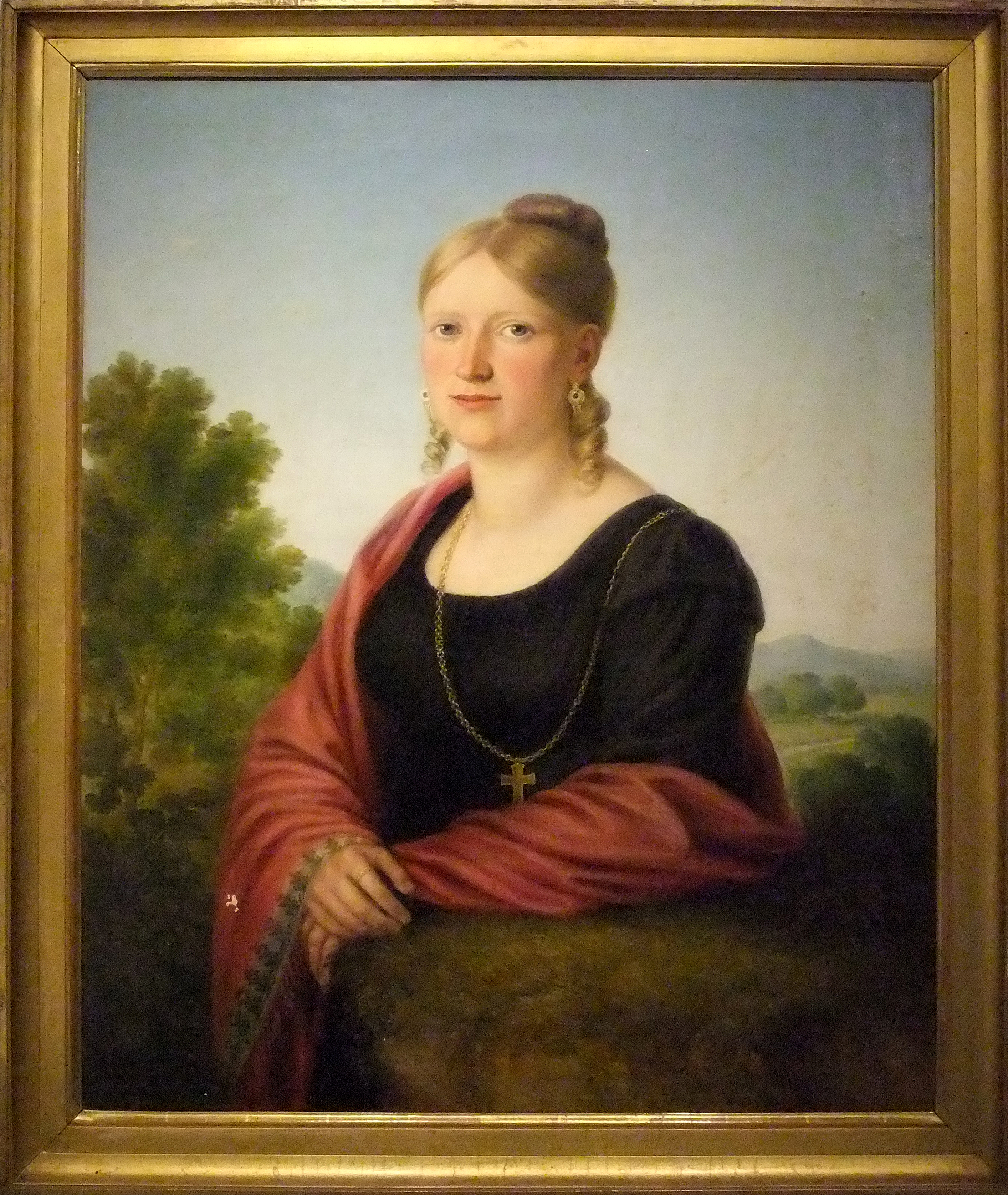 Frau Forstrat Gräter (undatiert, Öl auf Leinwand; Stadtarchiv Stuttgart)